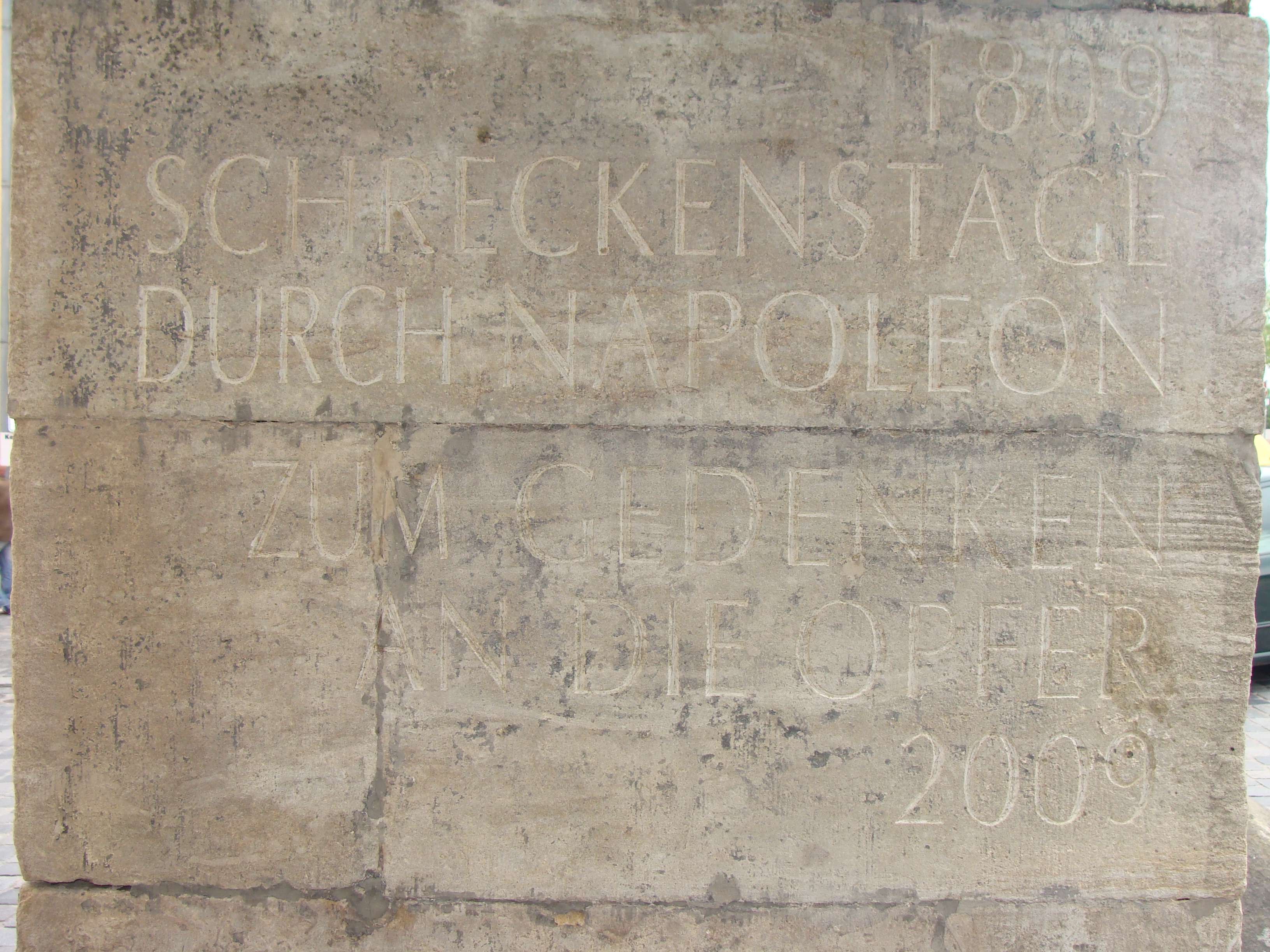 Inschrift im Pylonentor (Anlässlich des 200sten Jahrestags der Zerstörung von Stadtamhof wurde im Auftrag der Stadt Regensburg folgender Text eingemeisselt: "1809 SCHRECKENSTAGE DURCH NAPOLEON ZUM GEDENKEN AN DIE OPFER 2009". Anmerkung: Die Aussage ist historisch falsch.)